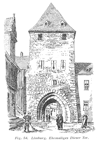 Former Diezer Tor